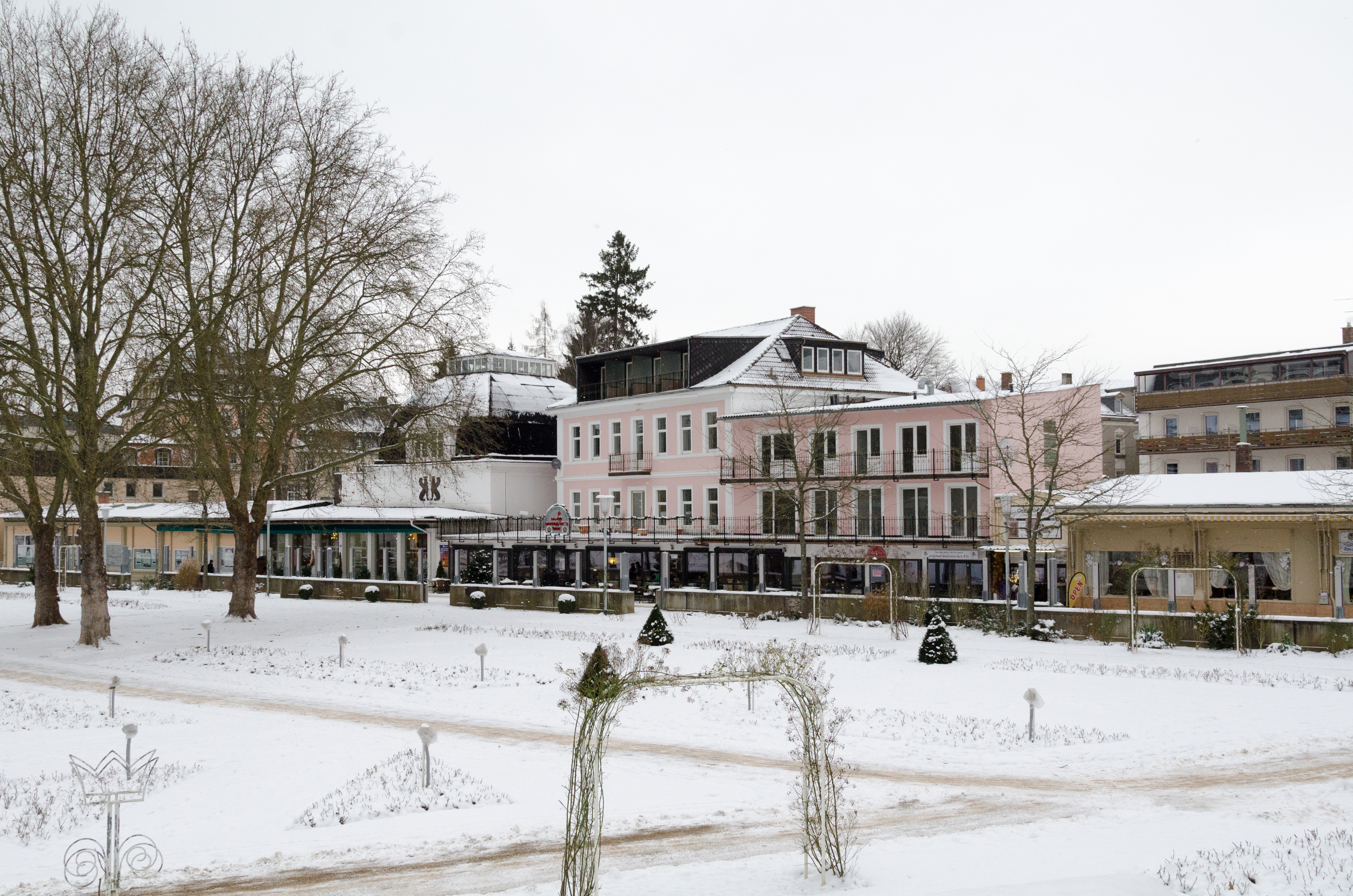 Bad Kissingen, Bazar, Balthasar-Neumann-Promenade